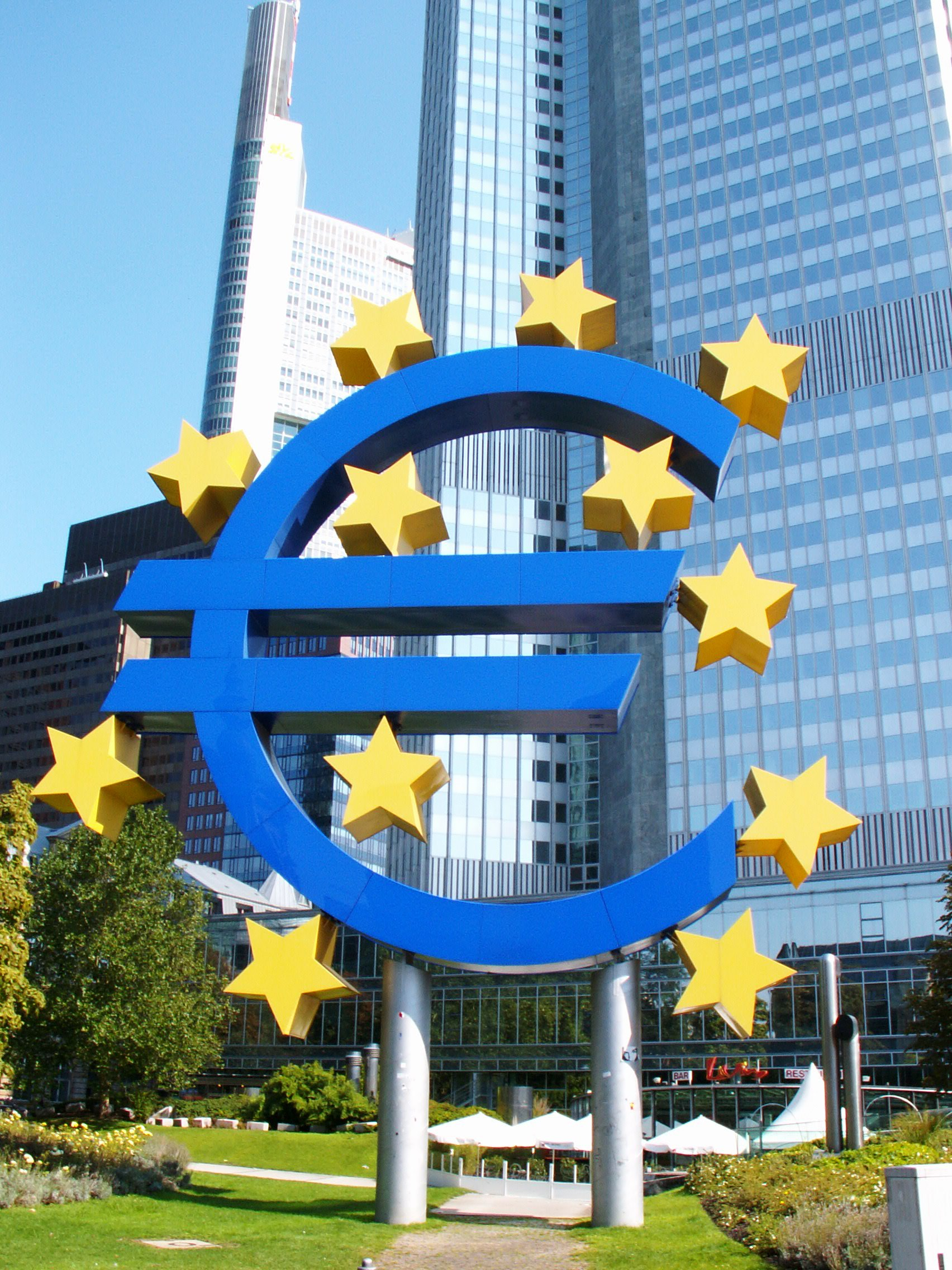 A new era